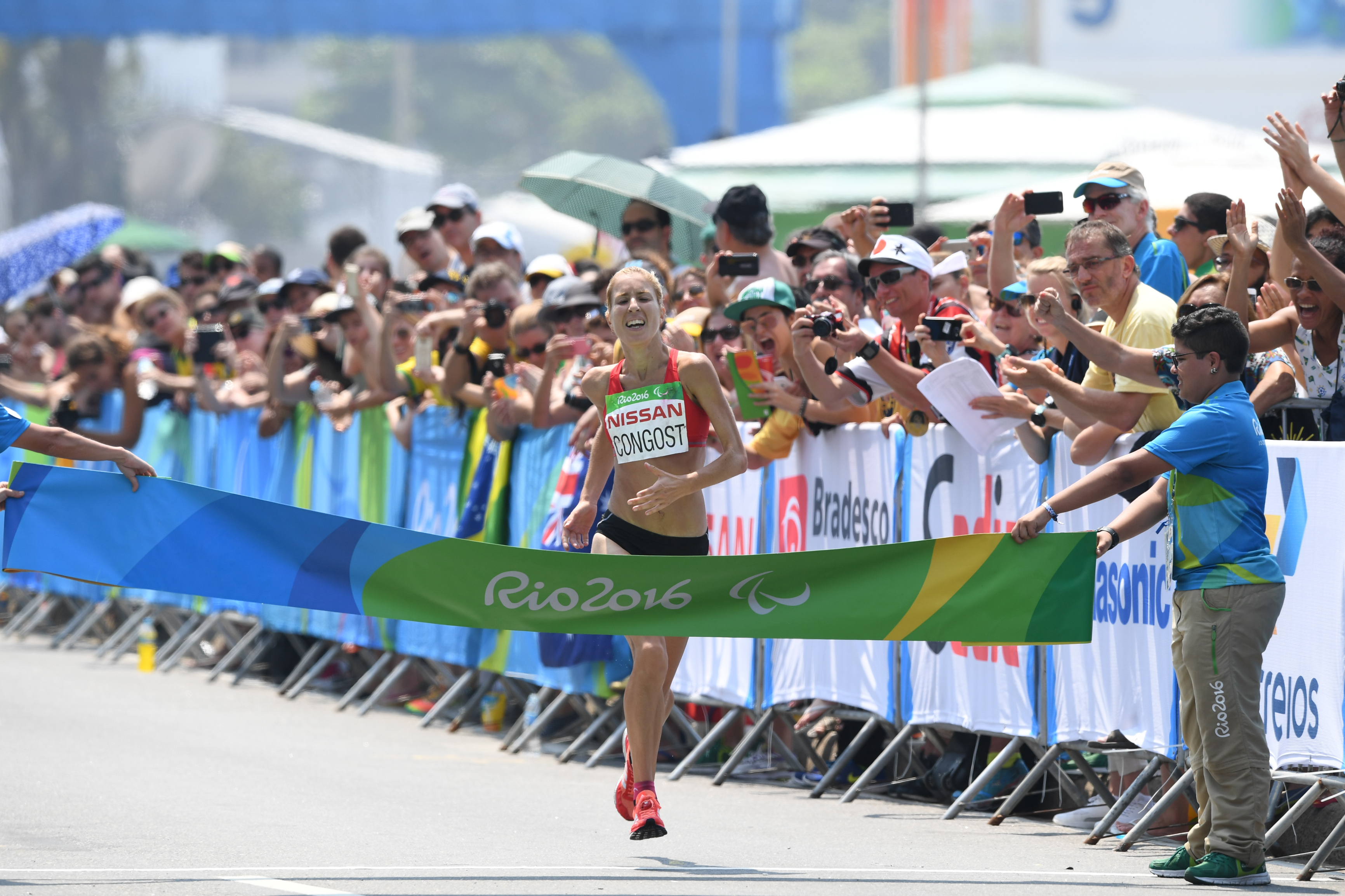 Rio de Janeiro - A espanhola, Elena Congost, ouro na categoria T12 na maratona Paralímpica T12 e T46, na praia de Copacabana (Tânia Rêgo/Agência Brasil)